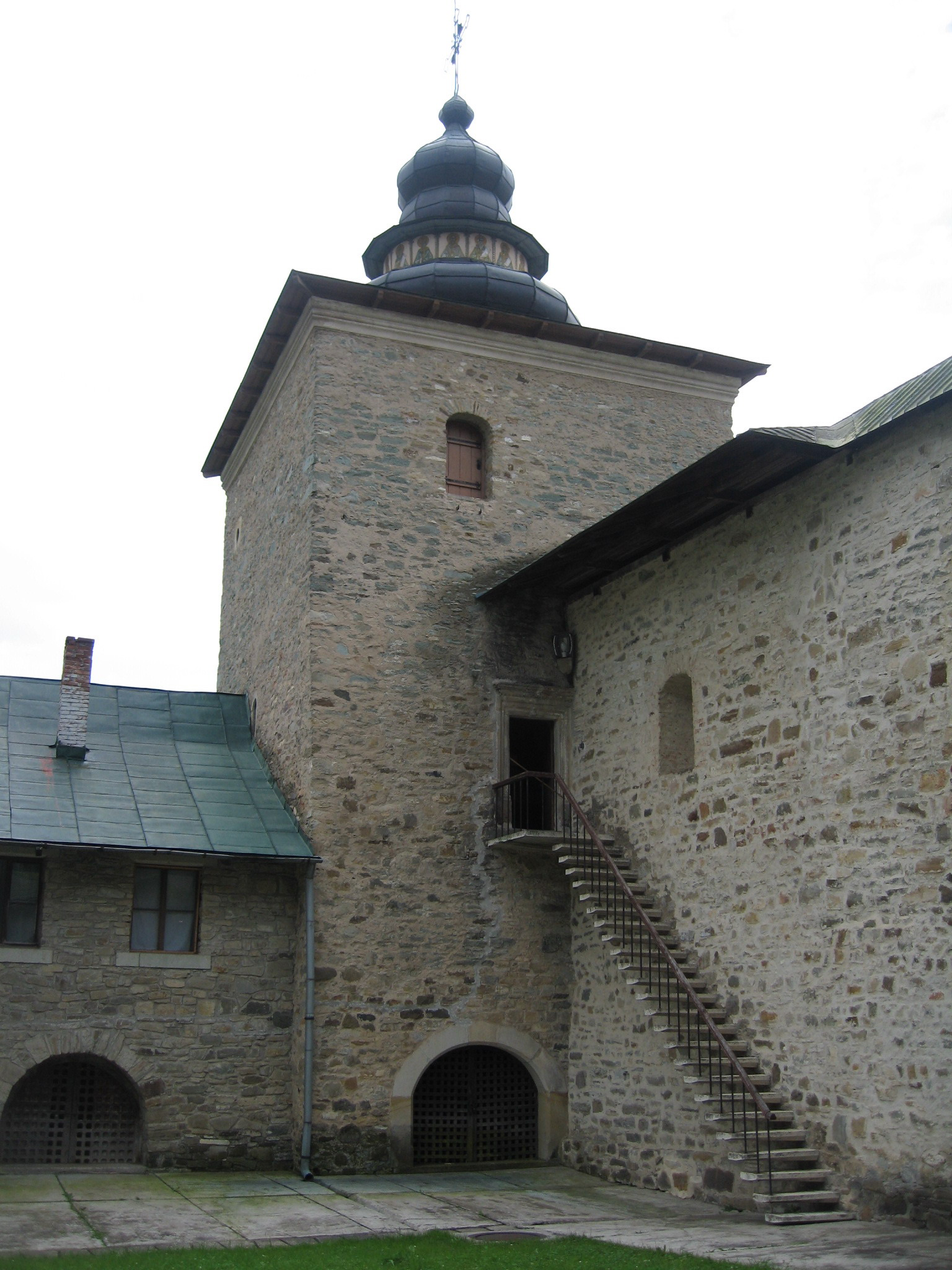 Mănăstirea Slatina - Turnul din colţul sud-vestic; la primul etaj, paraclisul cu hramul "Sf. Trei Ierarhi" 04